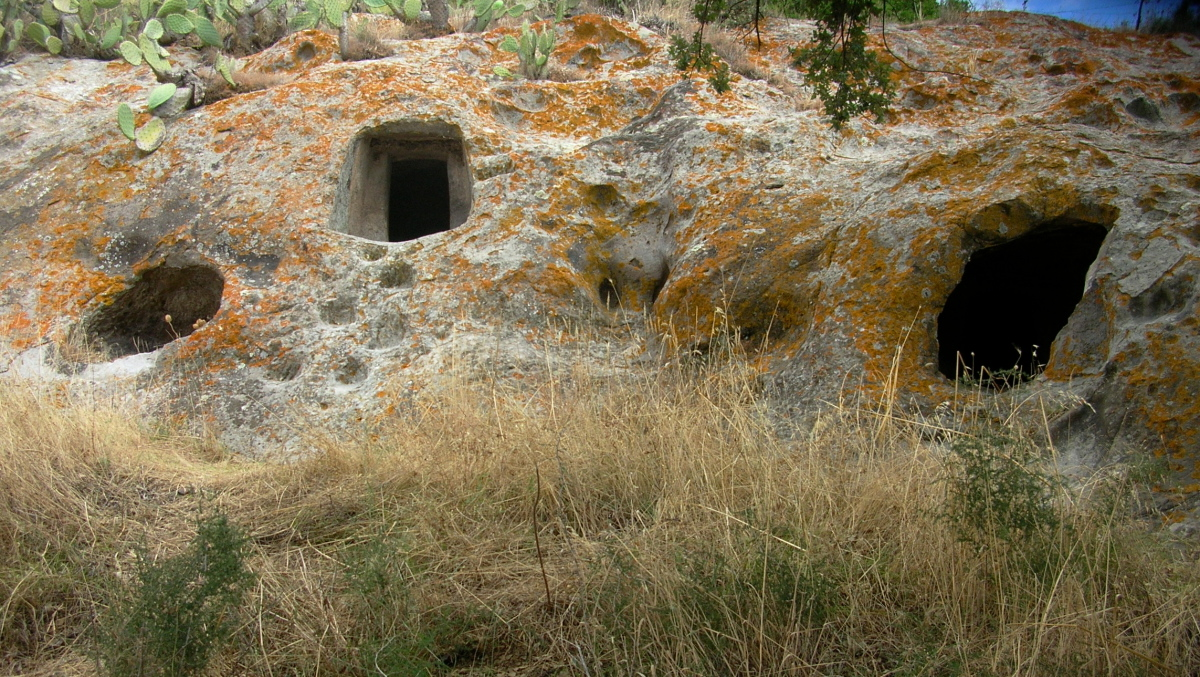 Parte orientale del complesso ipogeico di Oniferi